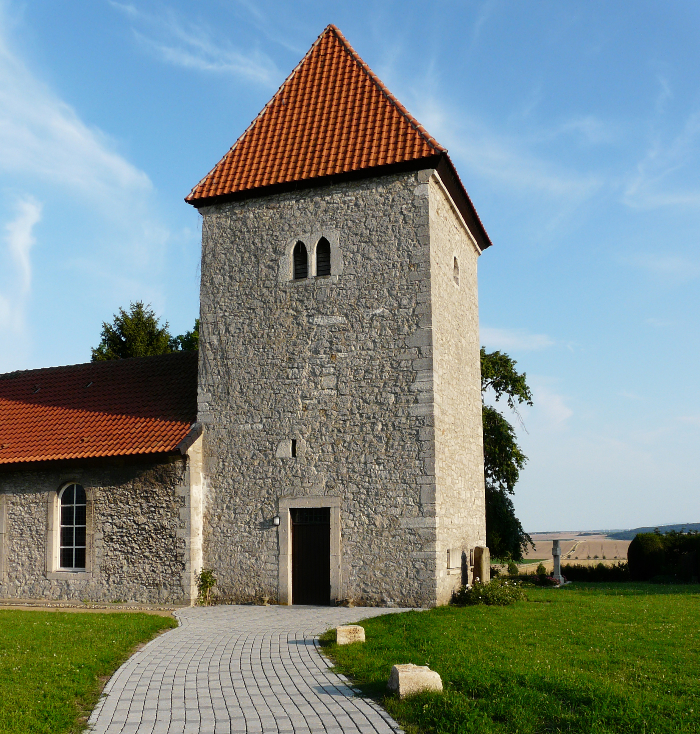 Gilzum, Dorfkirche